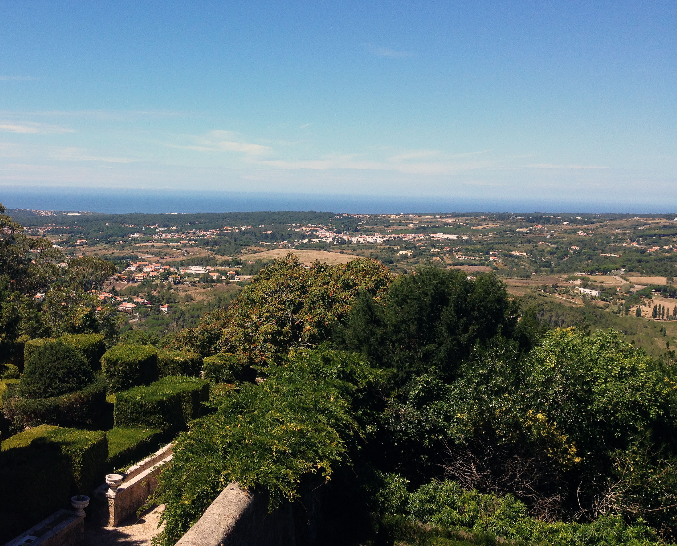 Sintra, Portugal